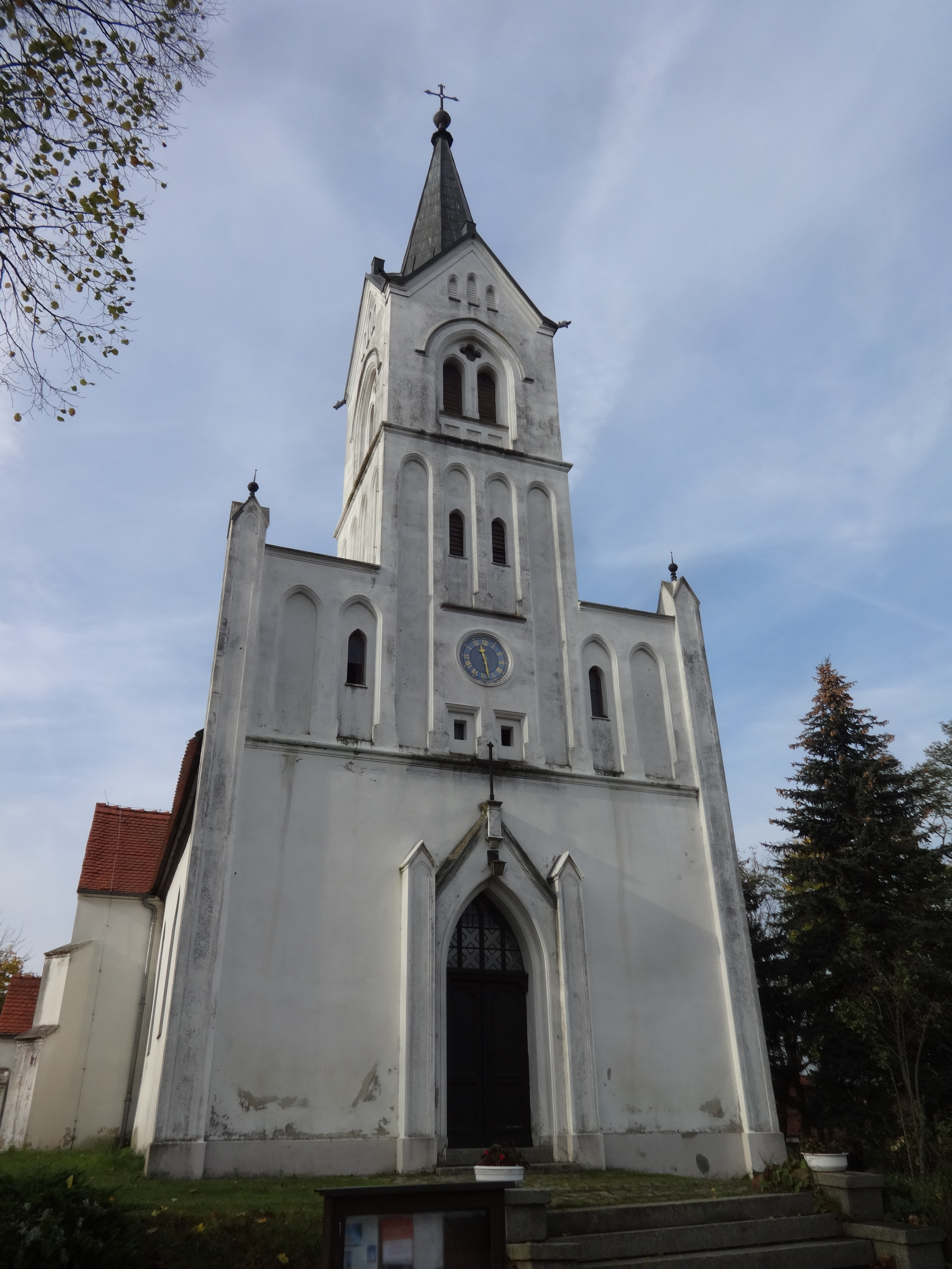 Die Dorfkirche in Trebnitz der Stadt Müncheberg ist eine neugotische Saalkirche, die in den Jahren 1864 und 1865 in der Sichtachse eines Herrenhauses errichtet wurde.